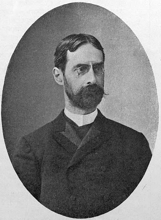 Икскуль фон Гильденбандт, Юлий Александрович